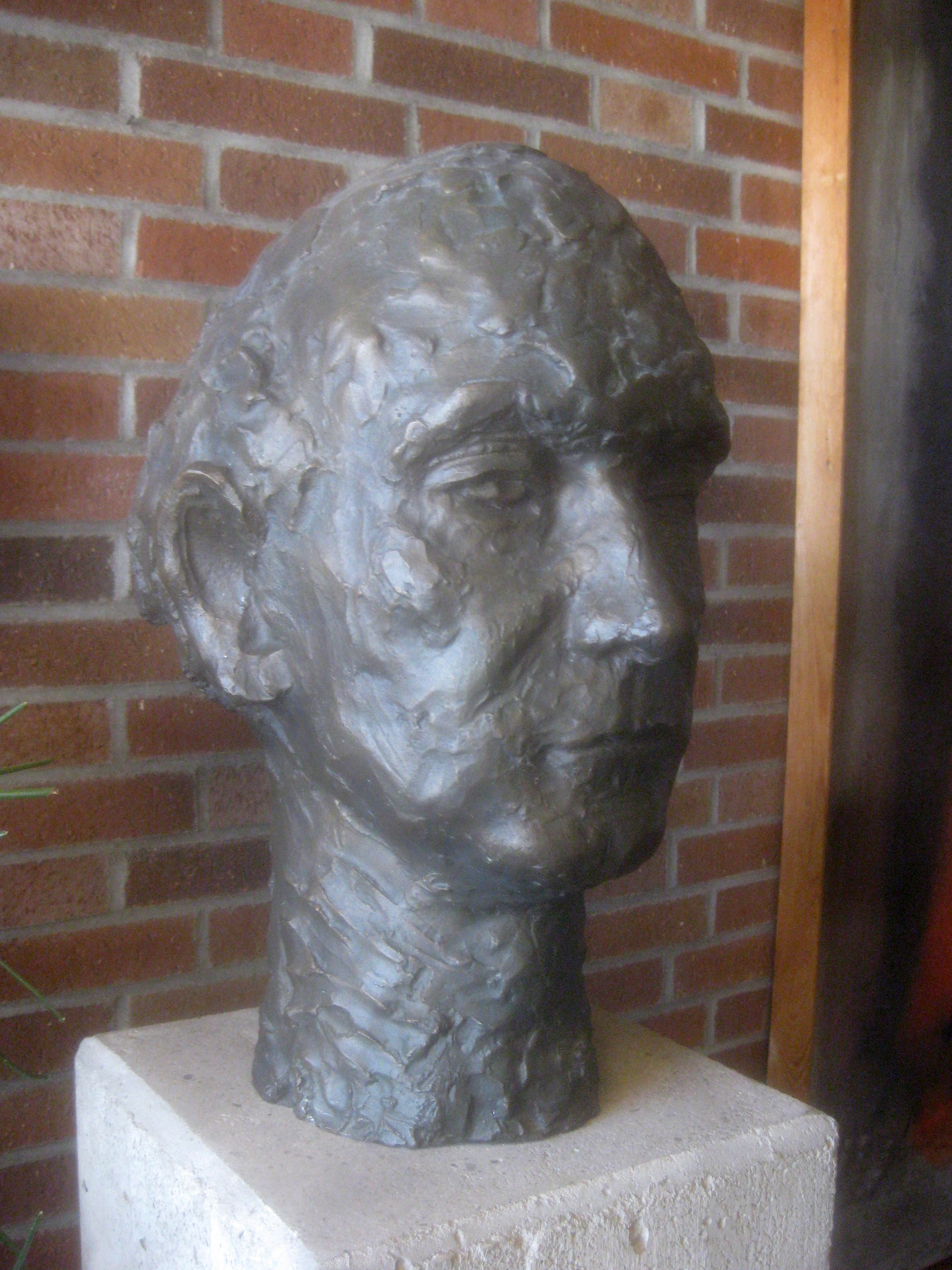 Wilhelm Hoffmann, erster Direktor der Württembergischen Landesbibliothek nach dem Zweiten Weltkrieg, Bronzebüste von Elfriede Hoffmann (1898–1974), 1958, Württembergische Landesbibliothek, Stuttgart.